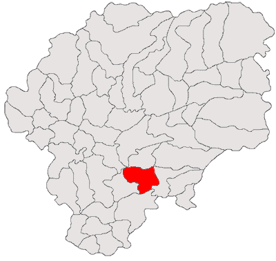 Categorie:Hărţi ale judeţului Bistriţa-Năsăud